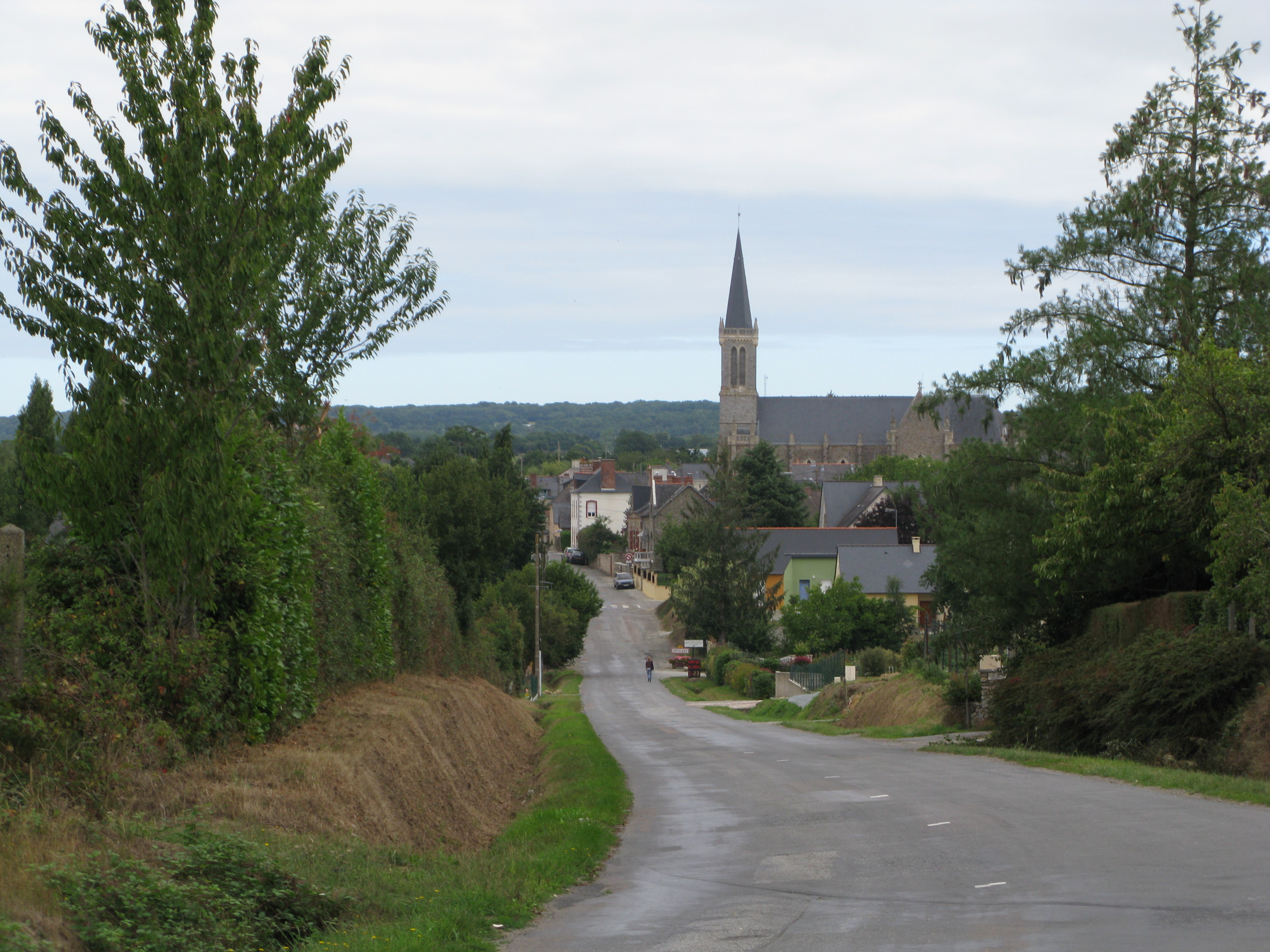 Vue générale sur Brielles (Ille-et-Vilaine, France).